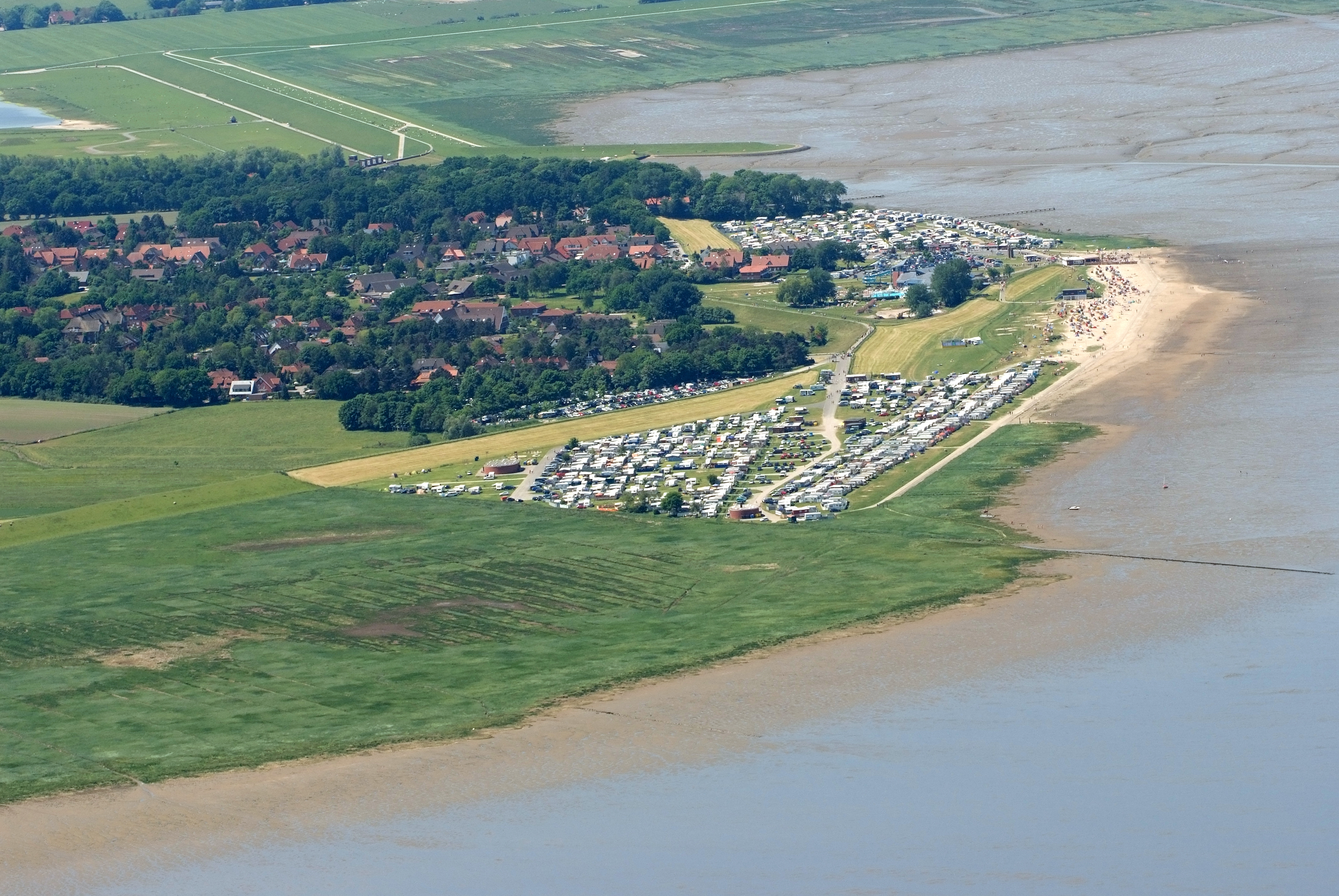 Dangast am Südende des Jadebusens, gesehen von Osten Fotoflug vom Flugplatz Nordholz-Spieka über Cuxhaven und Wilhelmshaven